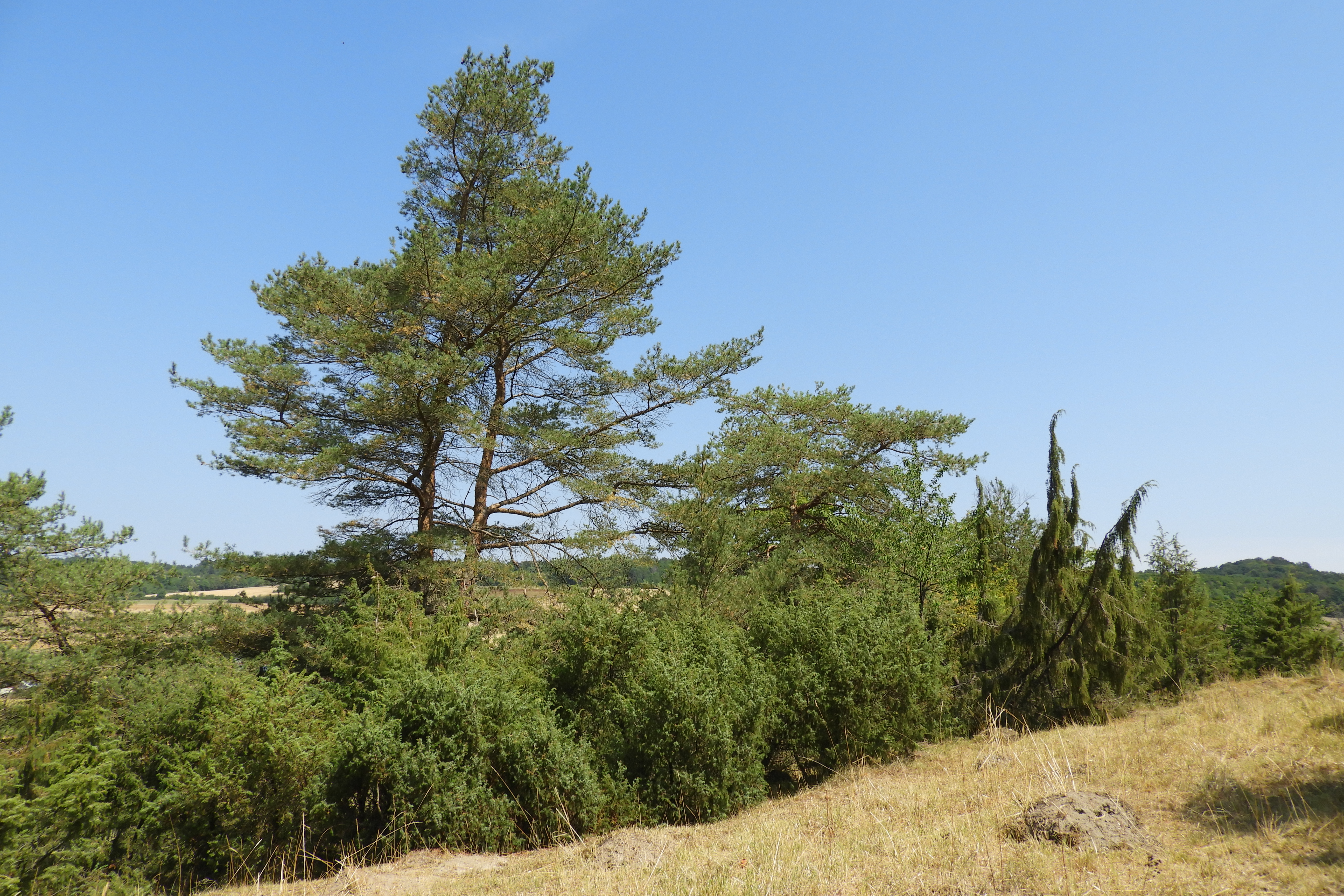 Der „Wald südöstlich von Netra“ liegt im nördlichen Hessen, in der Nähe der Landesgrenze zu Thüringen. Administrativ gehören die Flächen zu den Gemarkungen der Ortsteile Netra, Rittmannshausen und Lüderbach der Gemeinde Ringgau im nordhessischen Werra-Meißner-Kreis. Der sich in einer Talung des Muschelkalk-Plateaus des Ringgaus befindende Bereich wird durch ein Mosaik verschiedener Waldgesellschaften und von Kalk-Halbtrockenrasen geprägt. Wegen dem Vorkommen von Lebensräumen sowie Tier- und Pflanzenarten, die nach der im Jahr 1992 von den Mitgliedstaaten der Europäischen Union beschlossenen Flora-Fauna-Habitat-Richtlinie als von gemeinschaftlicher Bedeutung gelten, wurde der Bereich zu einem Bestandteil des europaweiten Schutzgebietssystems Natura 2000.